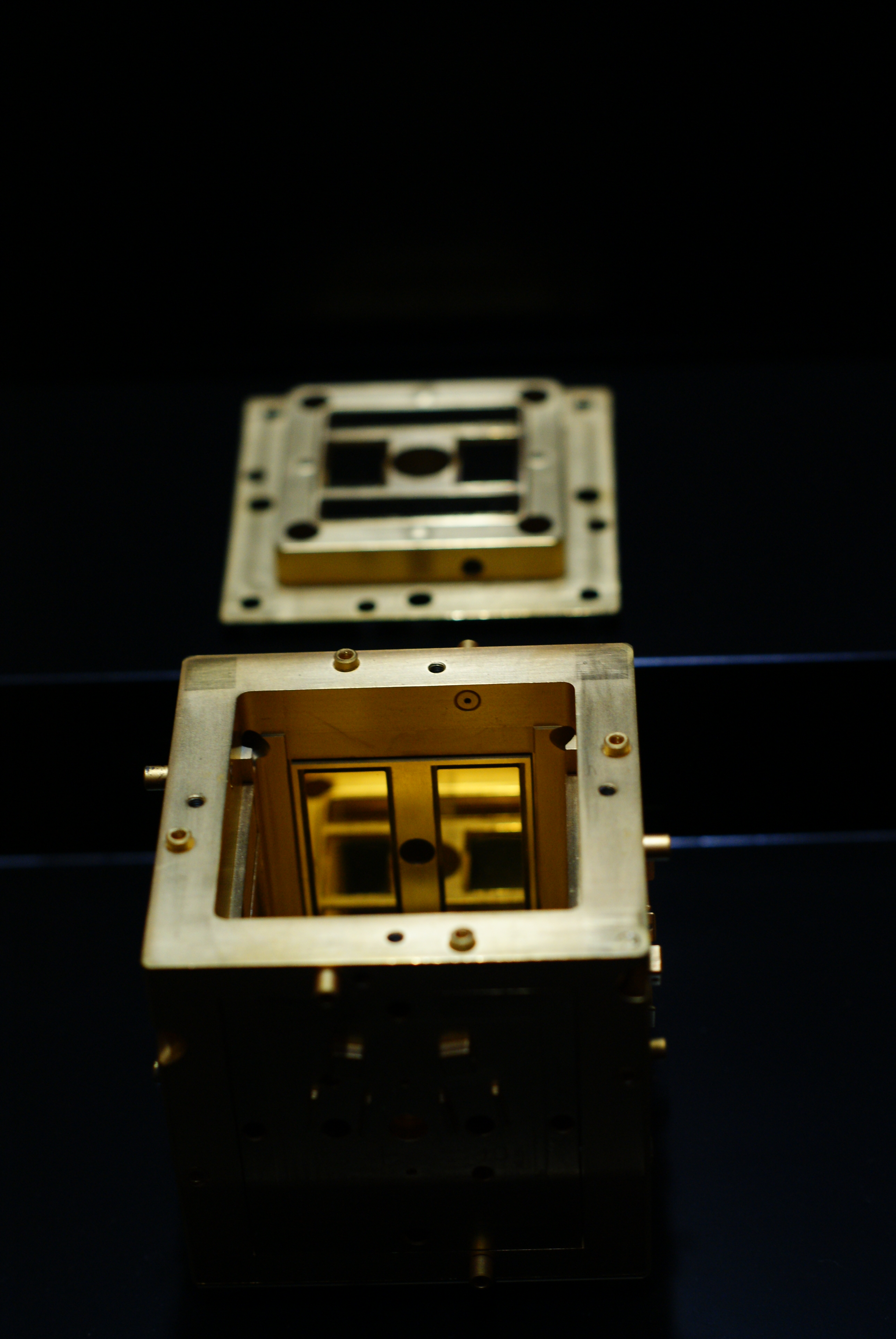 Artefacto donado y que se encuentra en San Pedro Cultural (Becerril de Campos, provincia de Palencia).